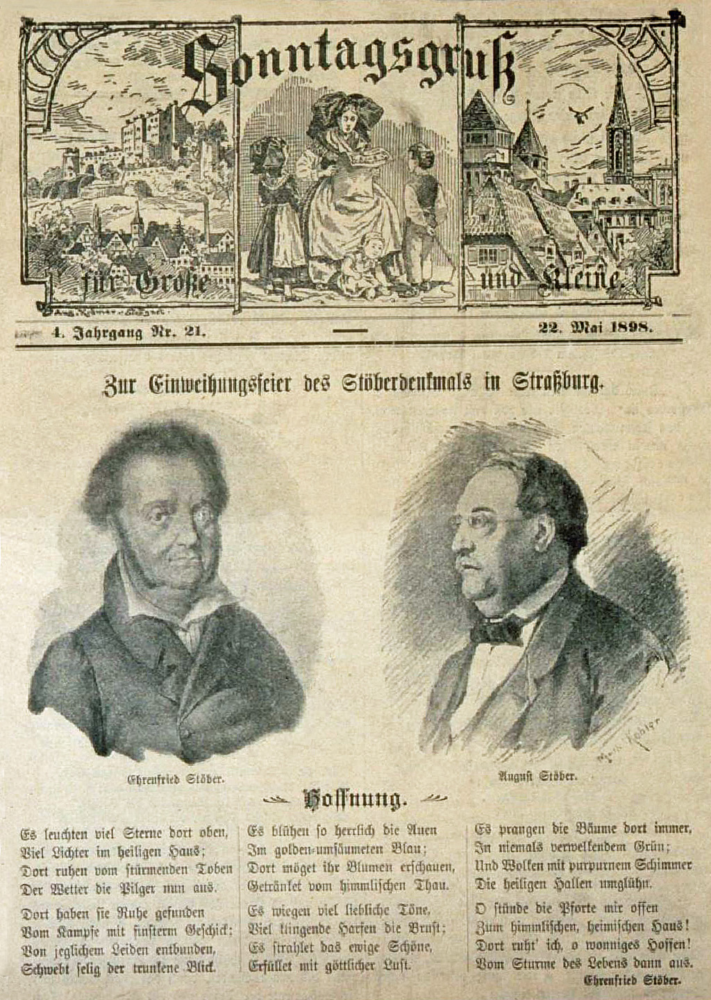 Zur Einweihungsfeier des Stœberdenkmals in Strassburg. Ehrenfried, und August Stœber, Buste, 3/4 à dr. et respectivement 3/4 à g, Bibliothèque nationale et universitaire de Strasbourg